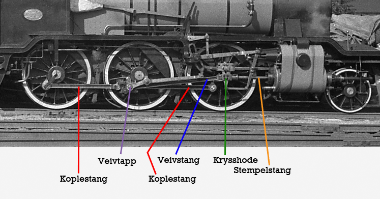 Drivverk på et damplokomotiv, NSB type 21b